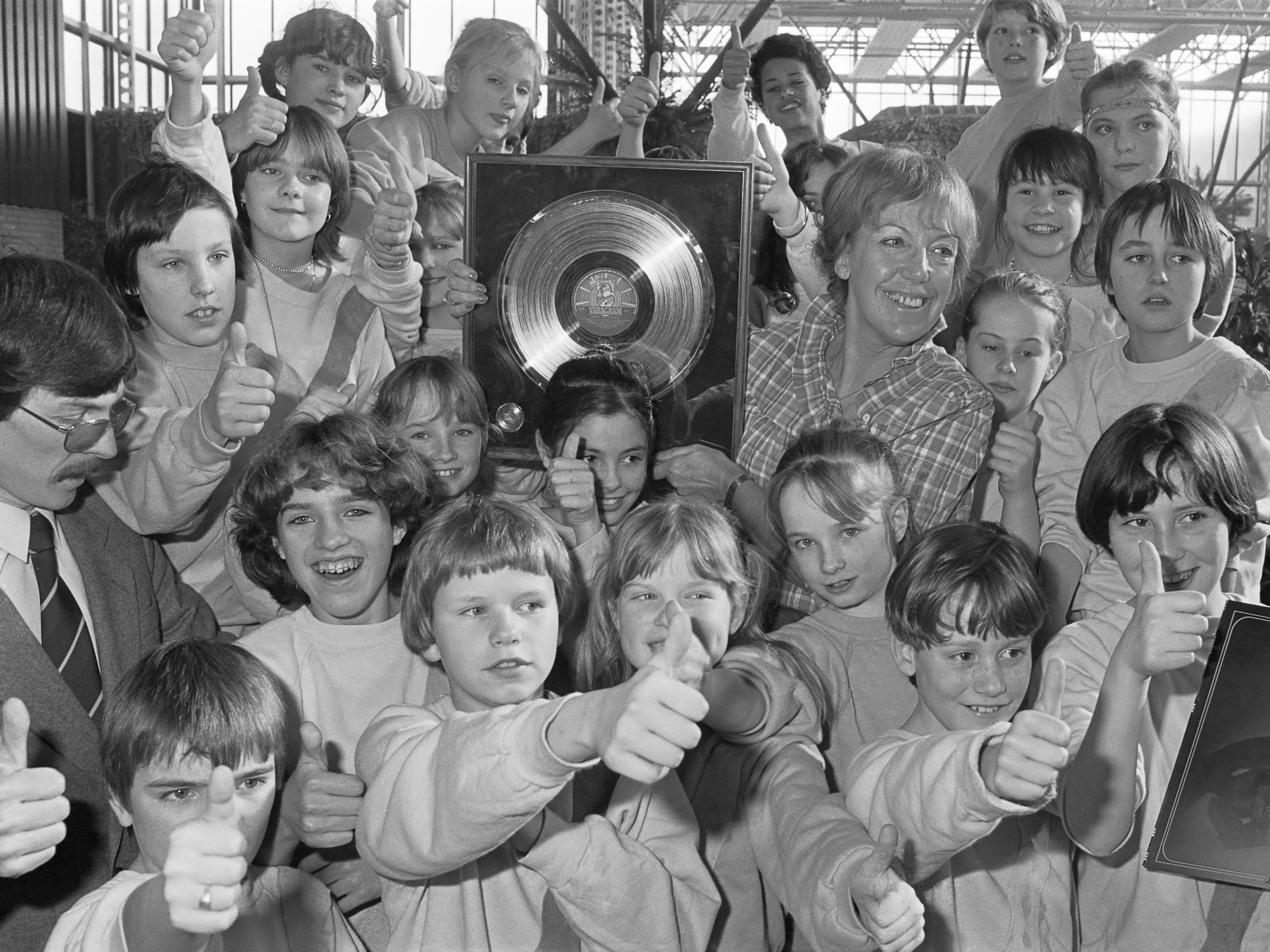 Platina plaat uitgereikt aan Flory Anstadt, producer plaat "kinderen voor kinderen 2" (200.000 verkocht). Flory Anstadt met leden kinderkoor en plaat 20 februari 1982